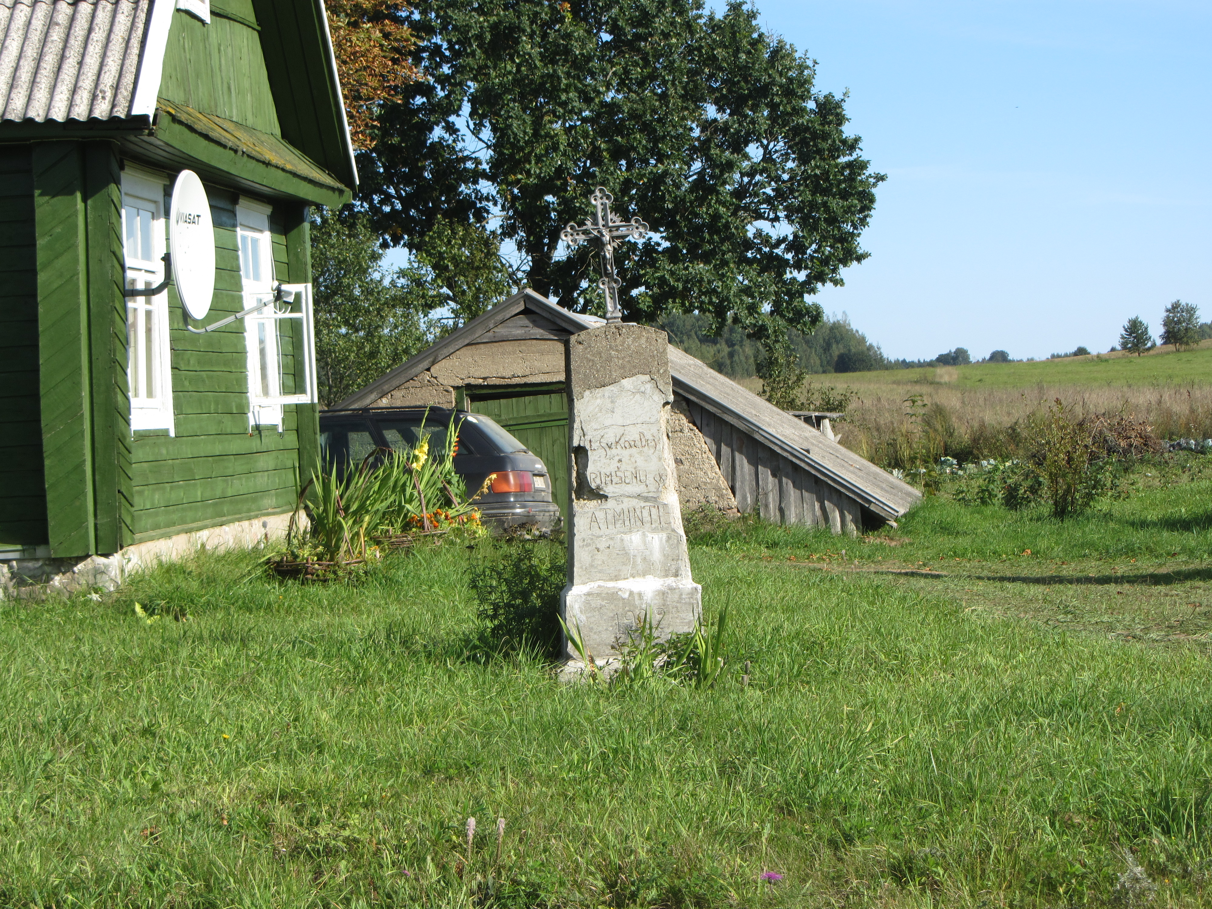 Vidiškės, Lithuania